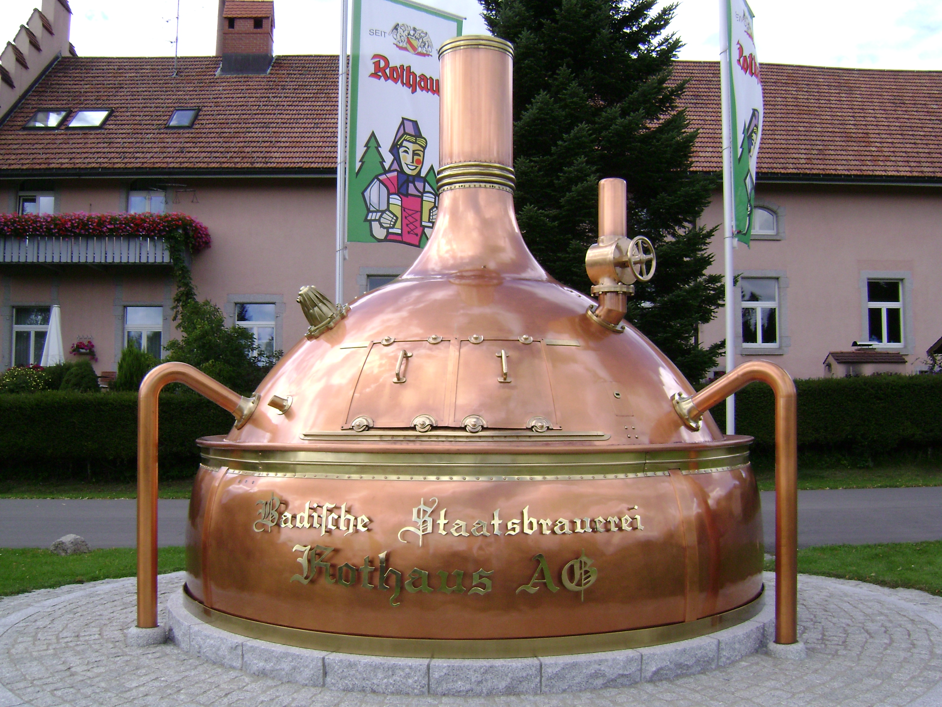 Kessel bei der Badischen Staatsbrauerei Rothaus.